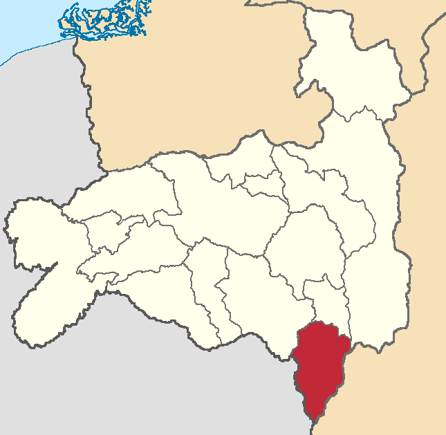 Mapa localizador del cantón en Loja, Ecuador